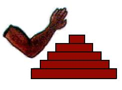 Escudo del municipio de Emiliano Zapata, Morelos.